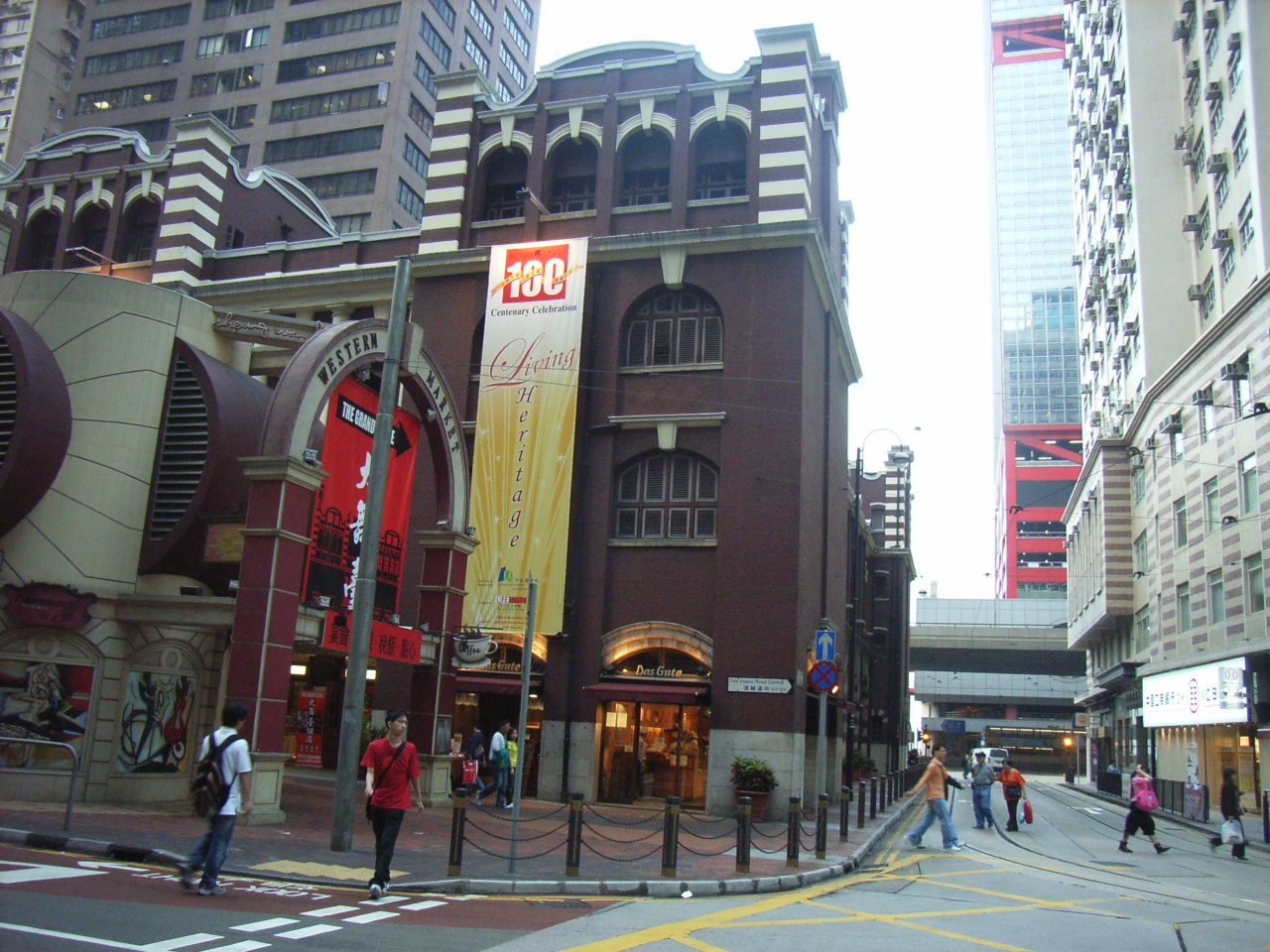 西港城(Western Market，前上環街市)位於香港上環zh:德輔道中323號